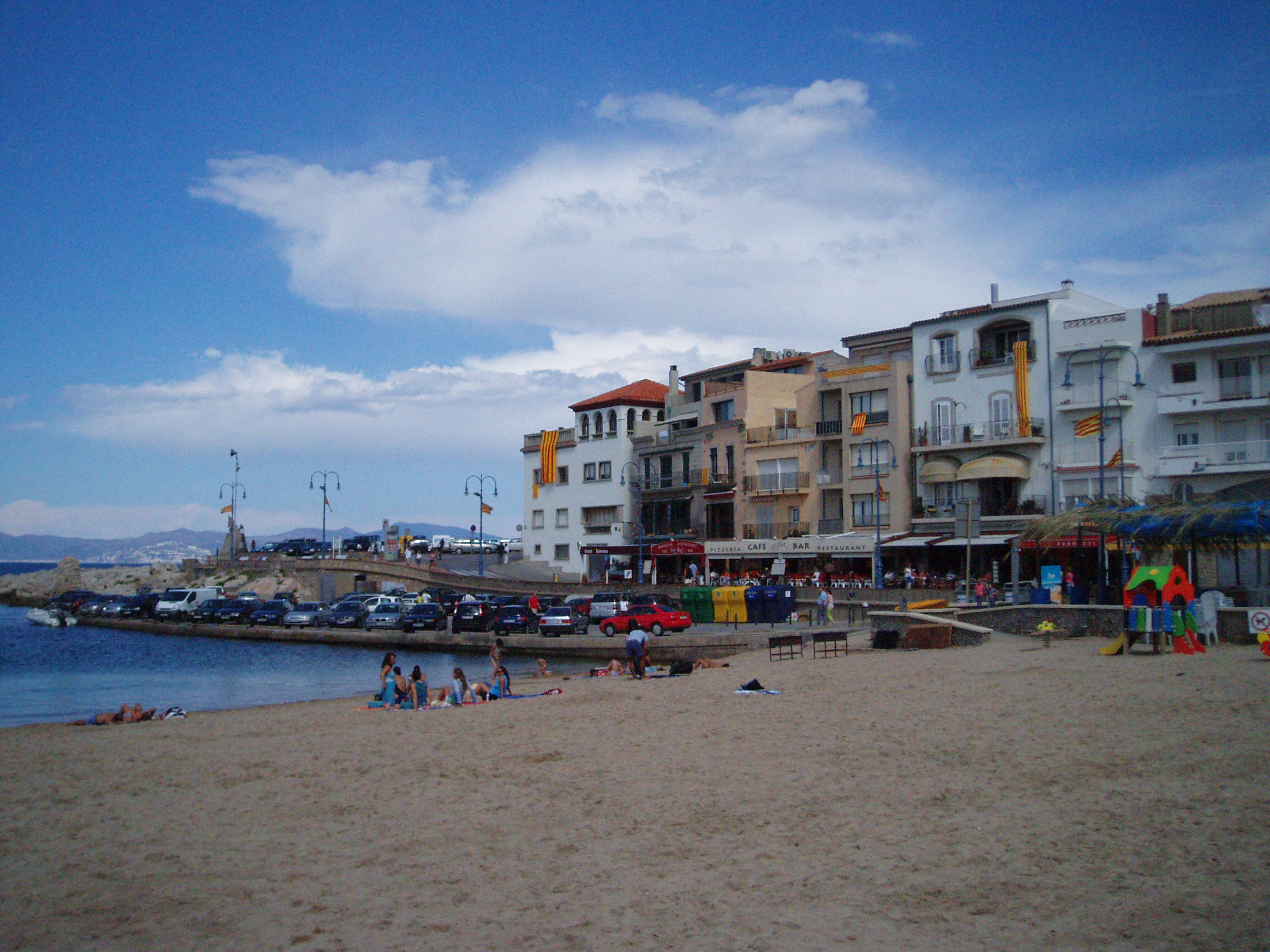 L'Escala Beach